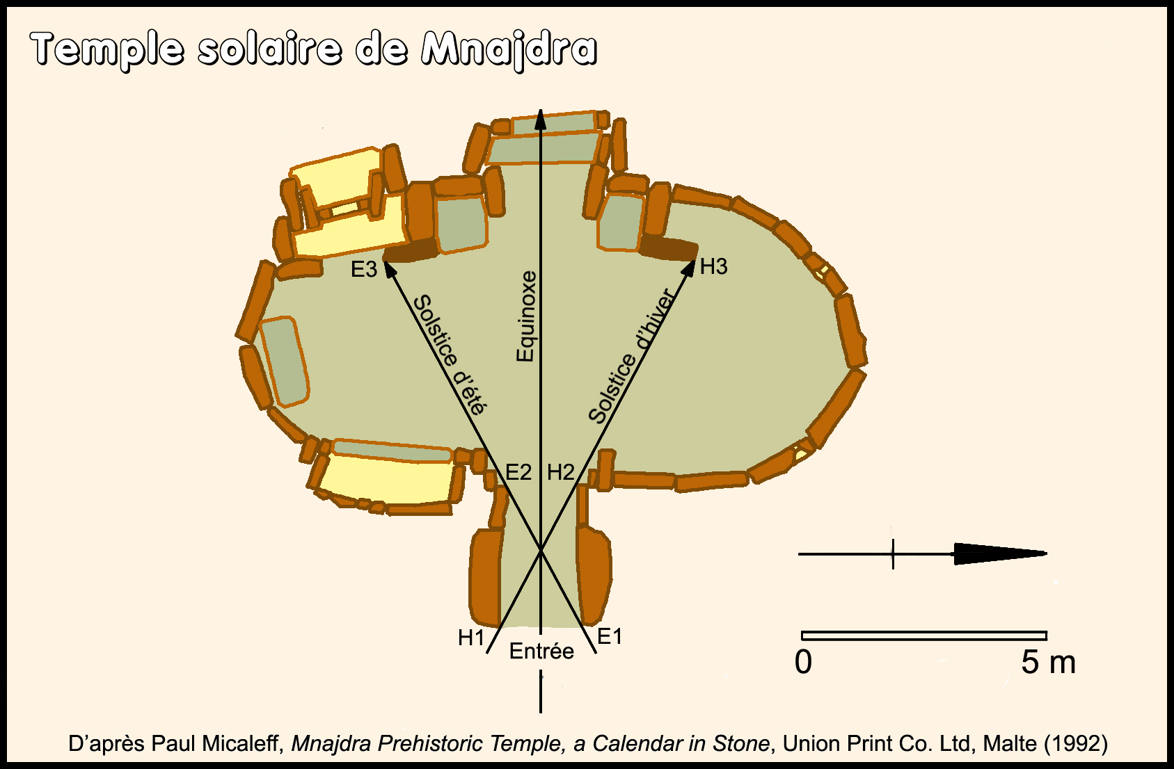 angle solaire dans le temple de Mnajdra